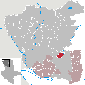 (Original text: Estedt im Landkreis Salzwedel)